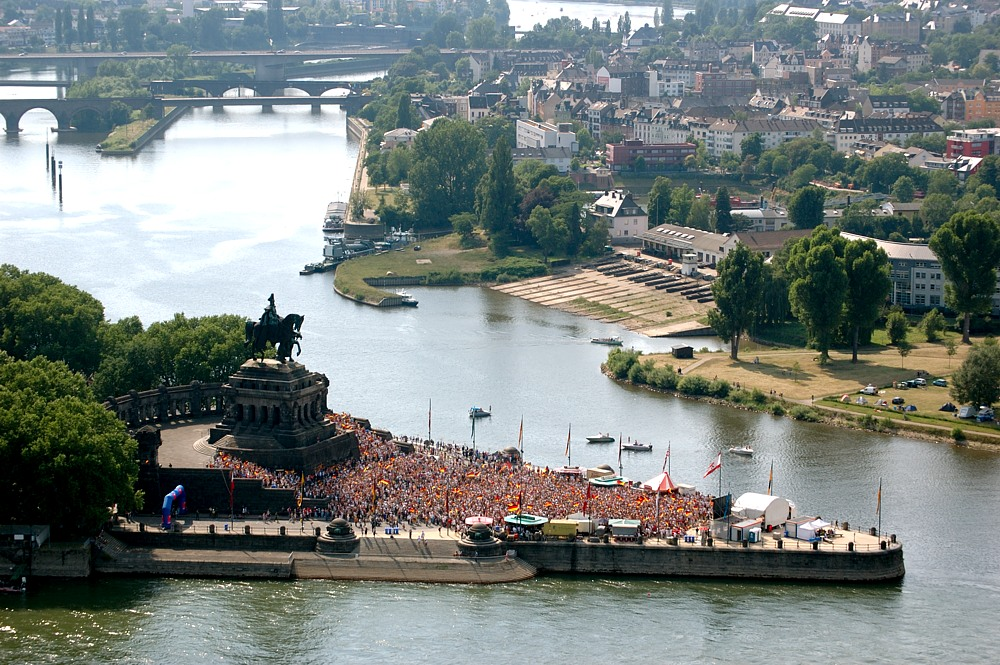 Fussball WM 2006 Achtelfinale Deutschland gegen Schweden Tor 2 Public Viewing am Deutschen Eck in Koblenz